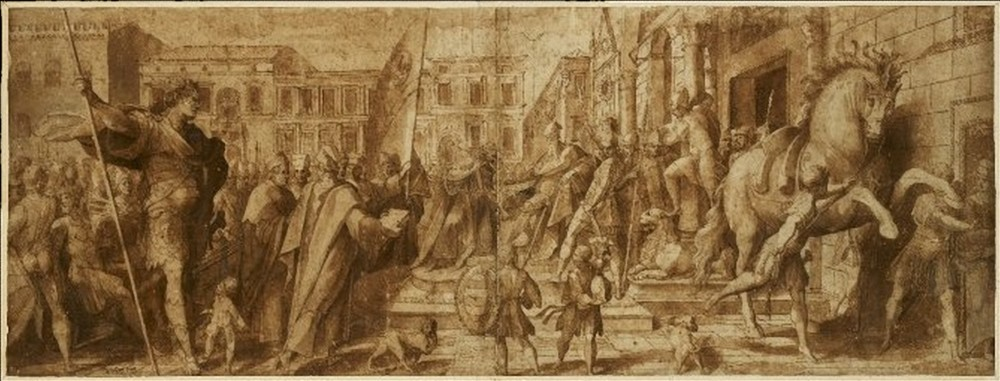 Giuramento di Luigi Gonzaga